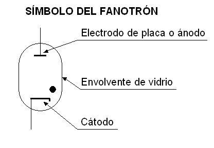 fr: schéma d'un phanotron (tube redresseur de courant à gaz inerte ou à vapeur de mercure). en: phanotron symbol (hot-filament diode rectifier tube utilizing an arc discharge in mercury vapor or inert gas)